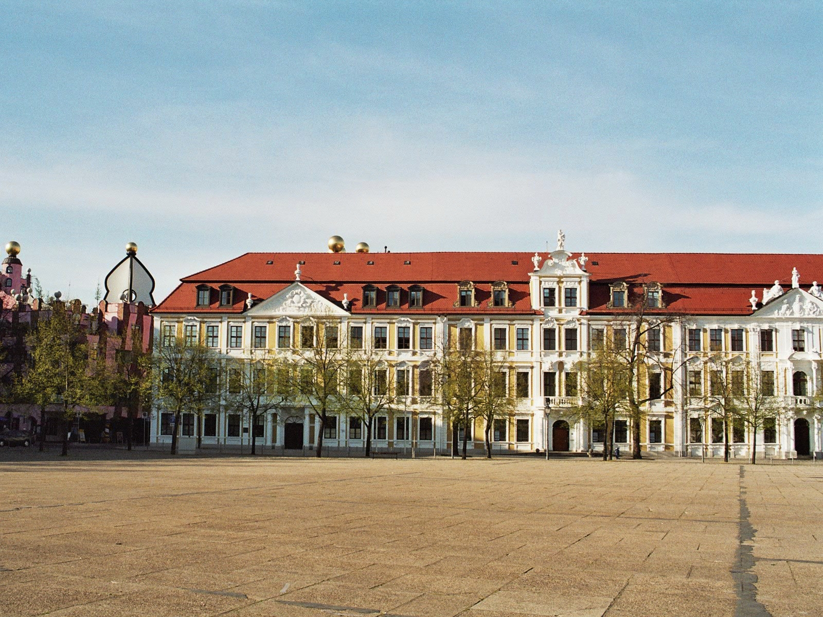 Der Landtag von Sachsen-Anhalt am Domplatz 6-9, 39104 Magdeburg, neben dem Gebäude der "Grünen Zitadelle" (links im Bild, fertiggestellt im Jahr 2005) nach Entwurf von Friedensreich Hundertwasser (Friedrich Stowasser), und gegenüber vom Dom zu Magdeburg St. Mauritius und Katharina